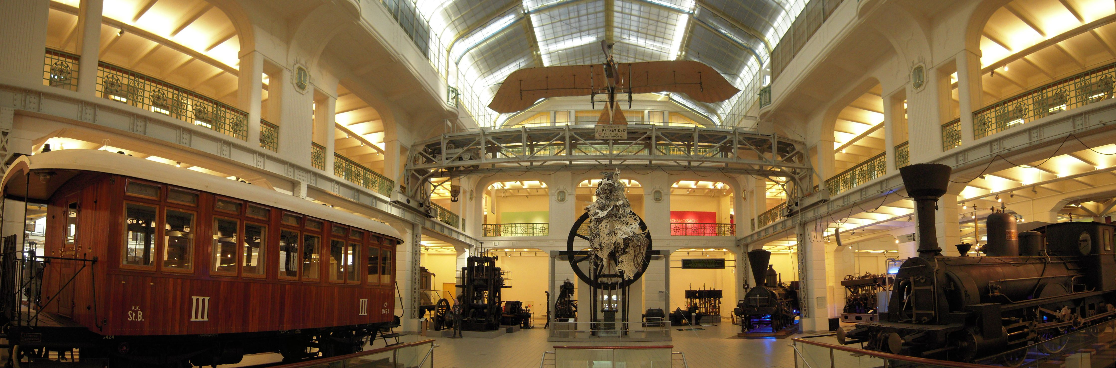 Eingangshalle des Technischen Museums in Wien